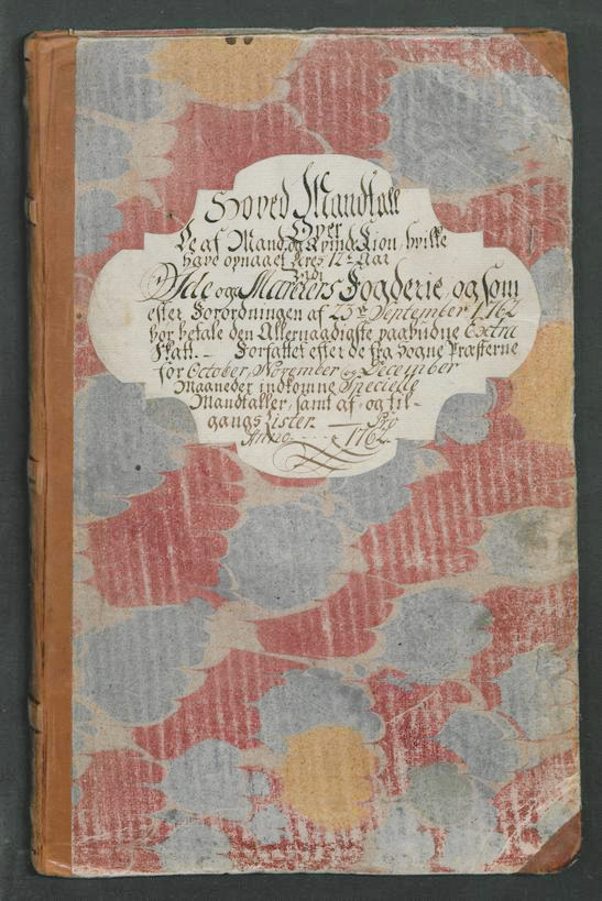 Forsiden til Ekstraskatten av 1762.